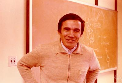 Foto di Josip Globevnik